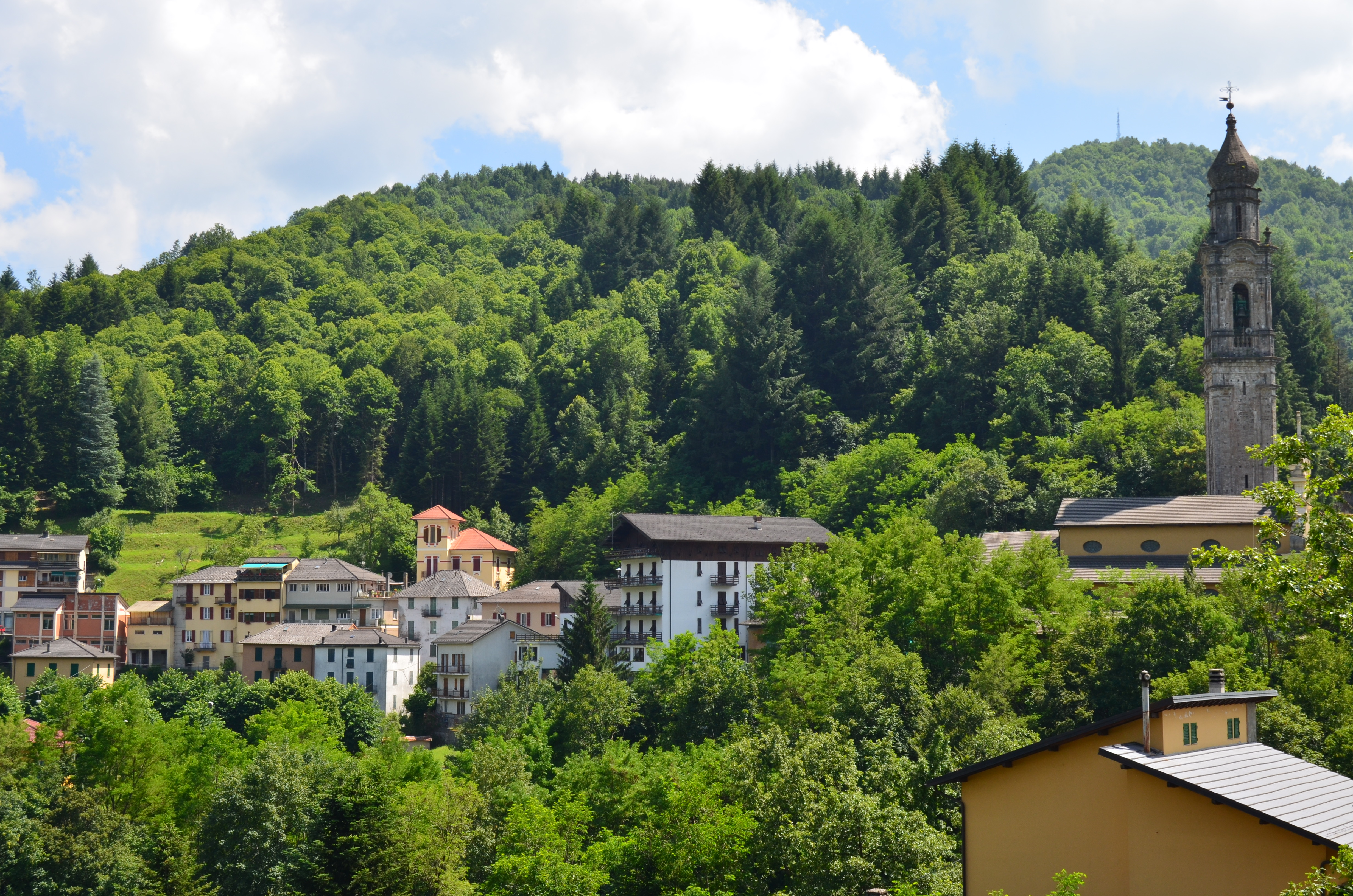 Panorama di Rezzoaglio, Liguria, Italia